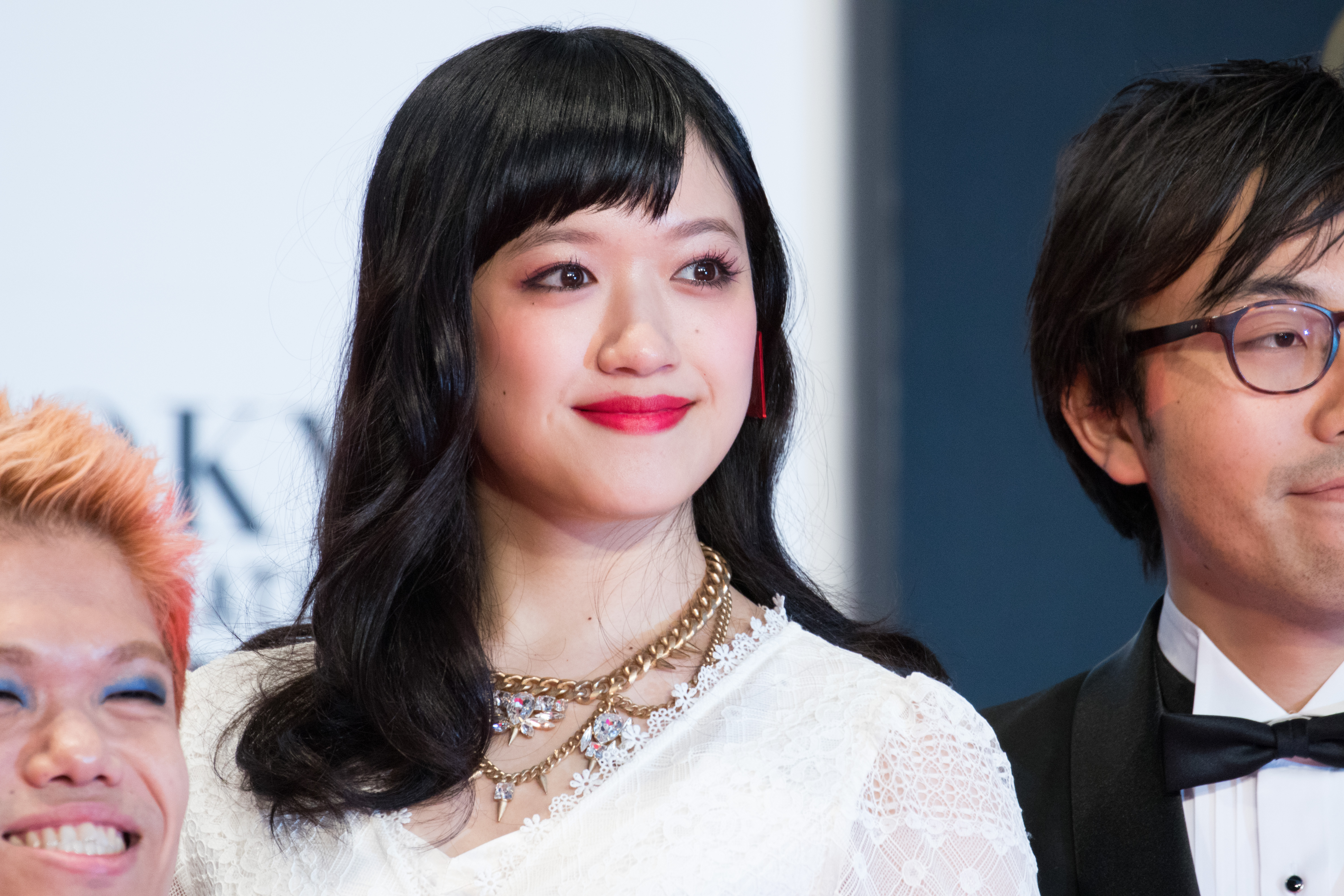 第29回 東京国際映画祭 オープニングセレモニー 三浦萌 (太陽を掴め)